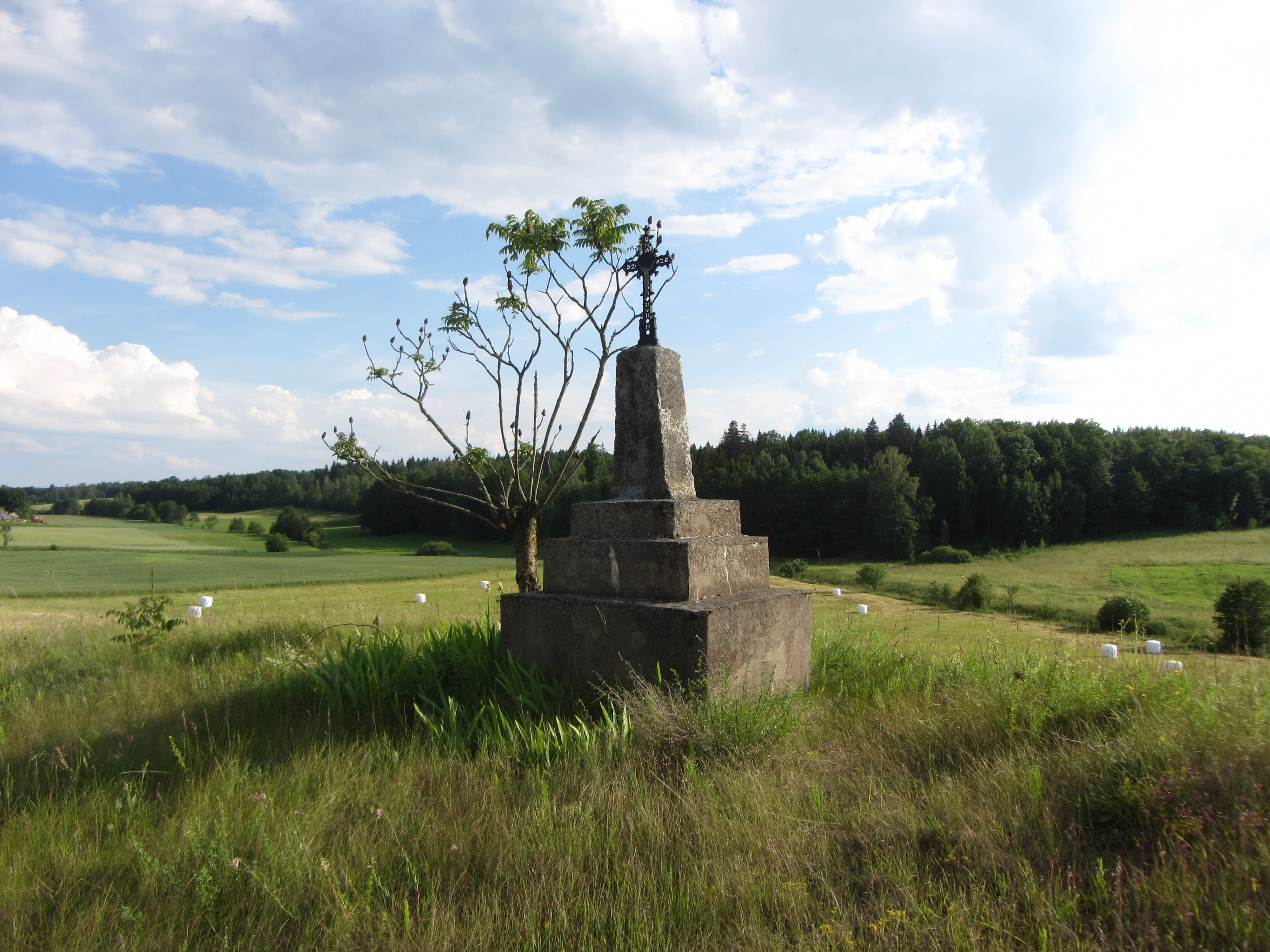 Gervėnai, Lithuania